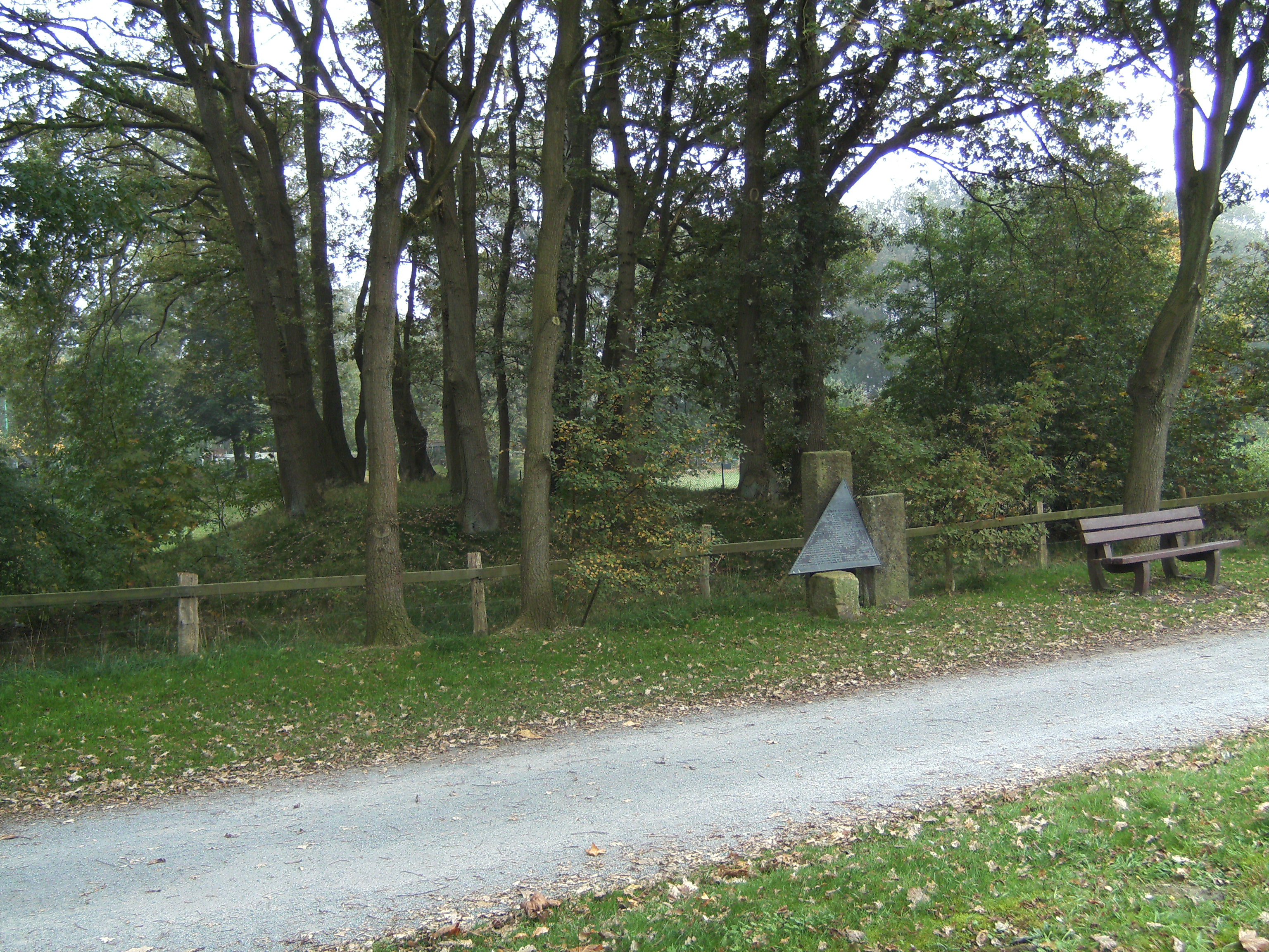 Großsteingrab in Rheine-Schotthock